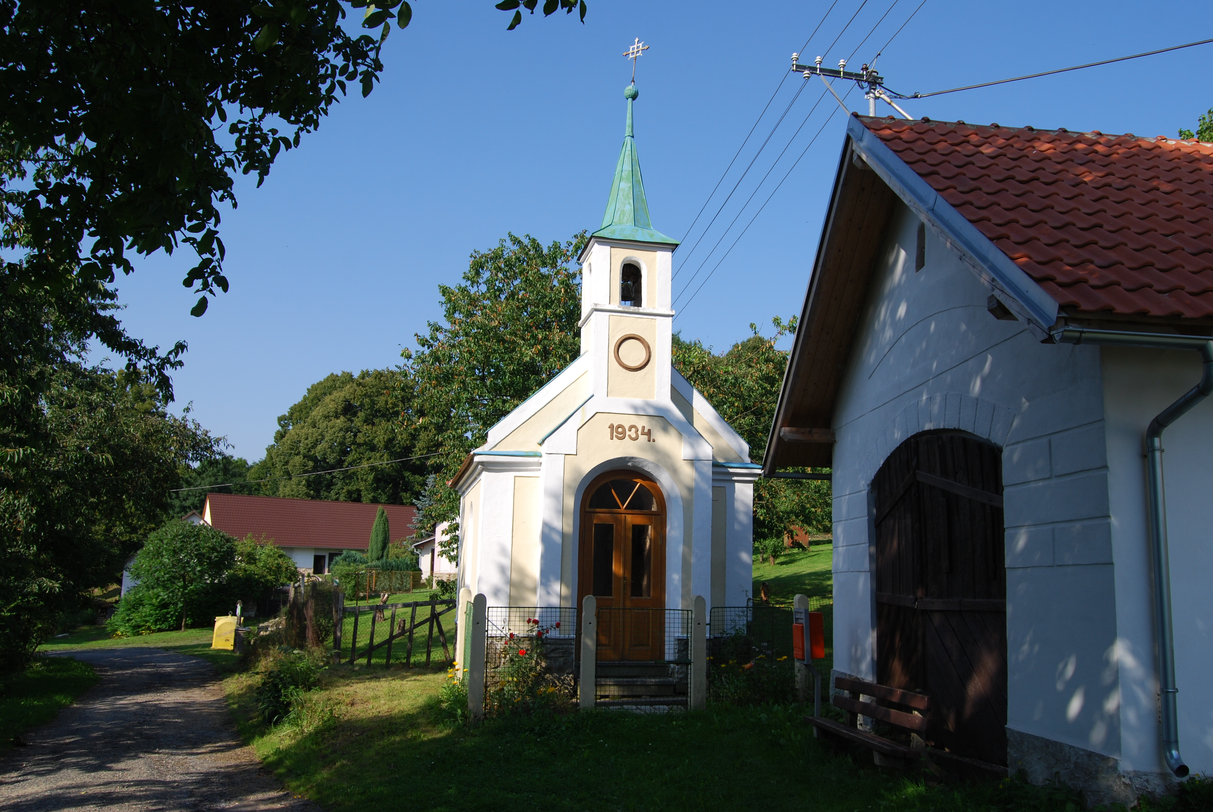 Kaple a zbrojnice. Vratišov je část obce Nadějkov v okrese Tábor. Česká republika.